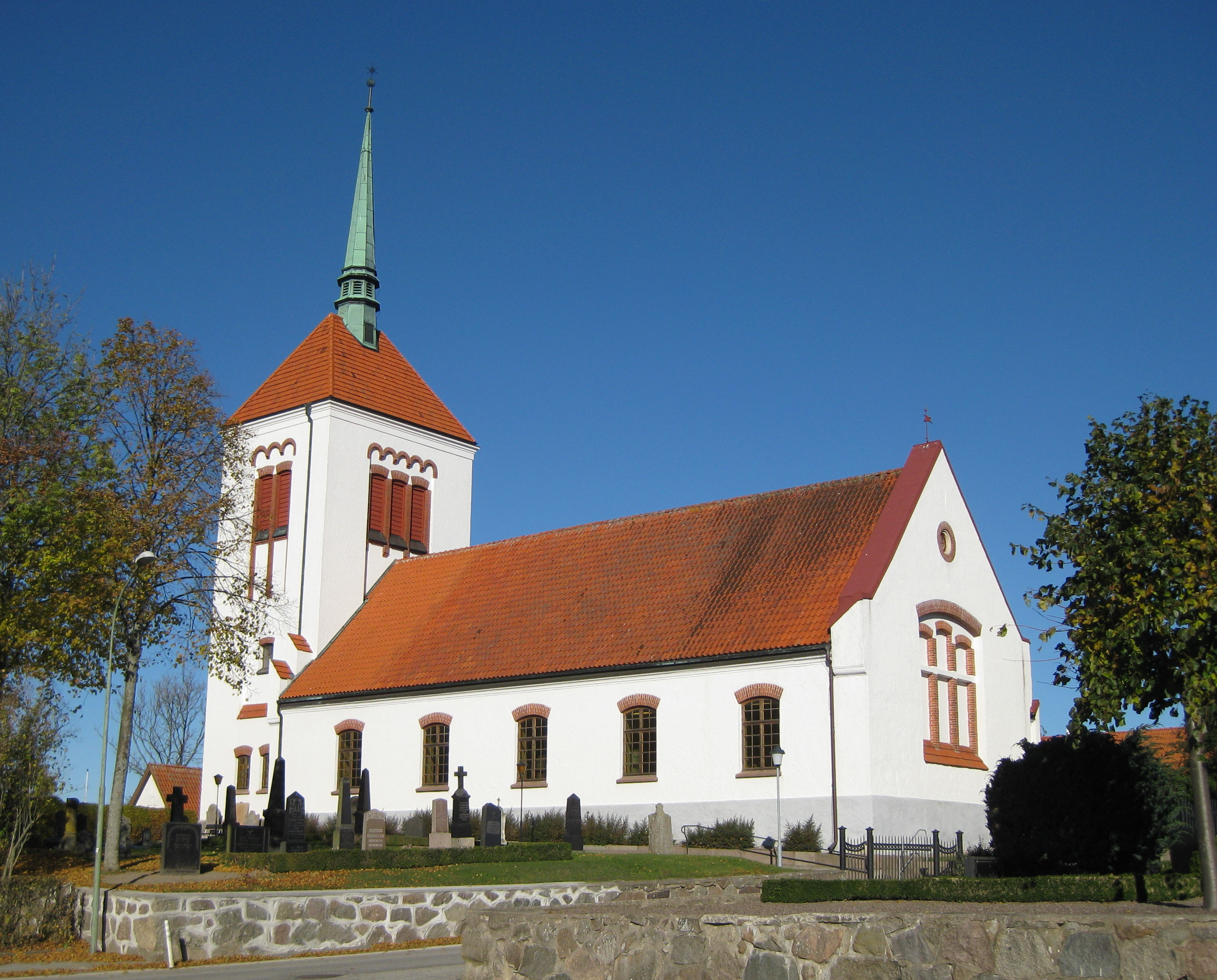 Slimminge kyrka i Skurups kommun